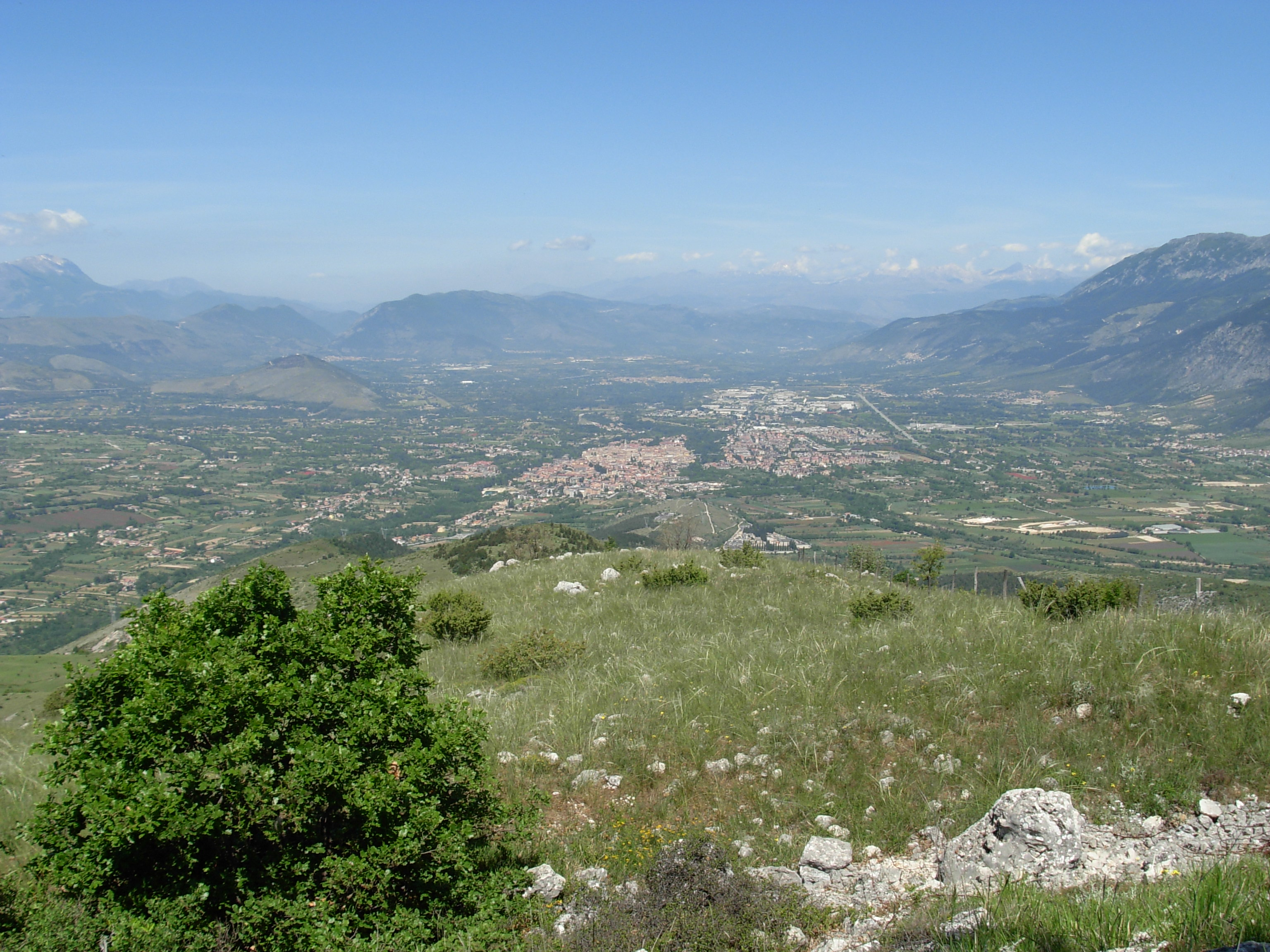 Valle Peligna da colle Mitra